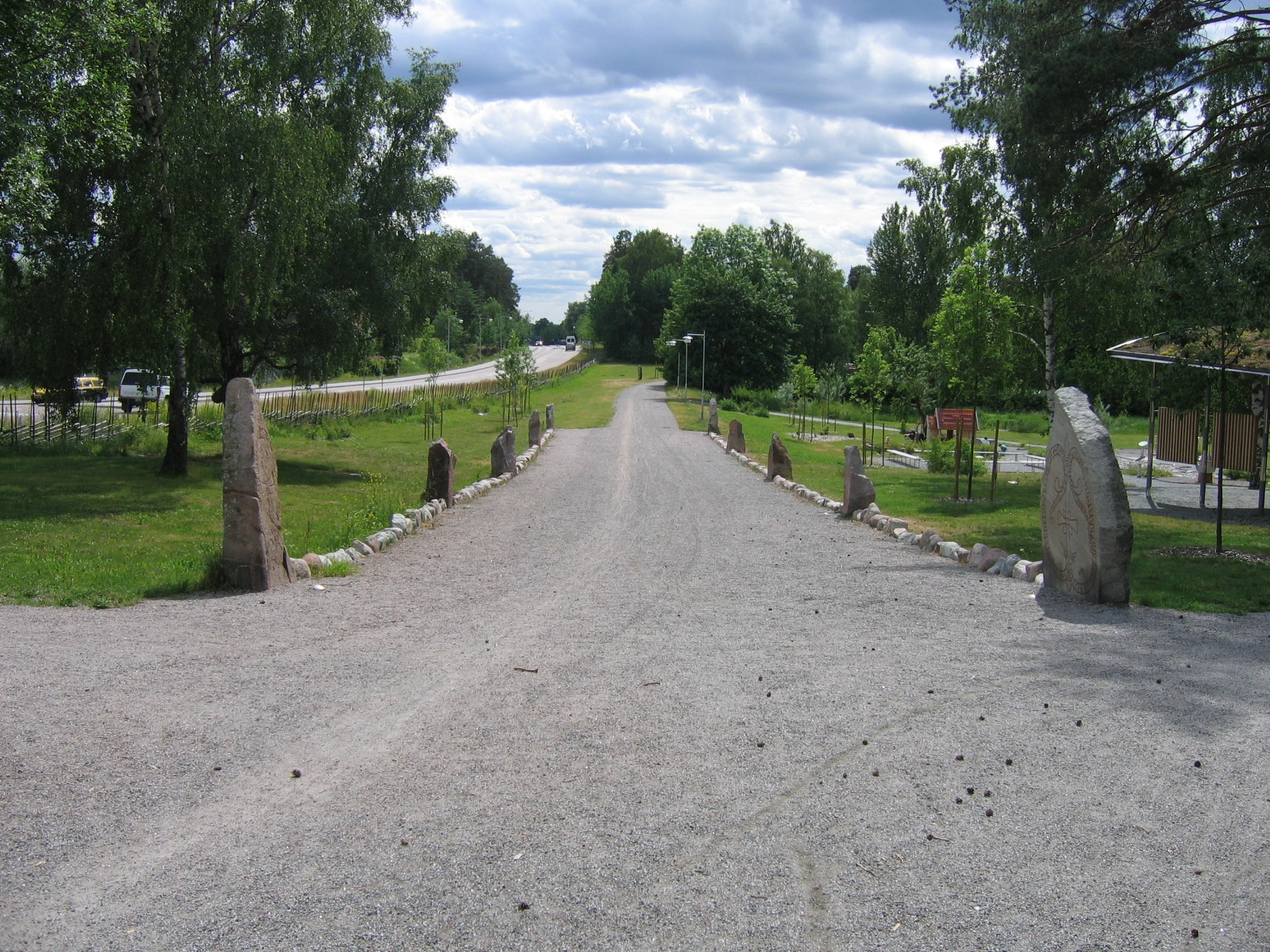 Jarlabankes bro i Täby. Till vänster runstenen U 164, till höger U 165.